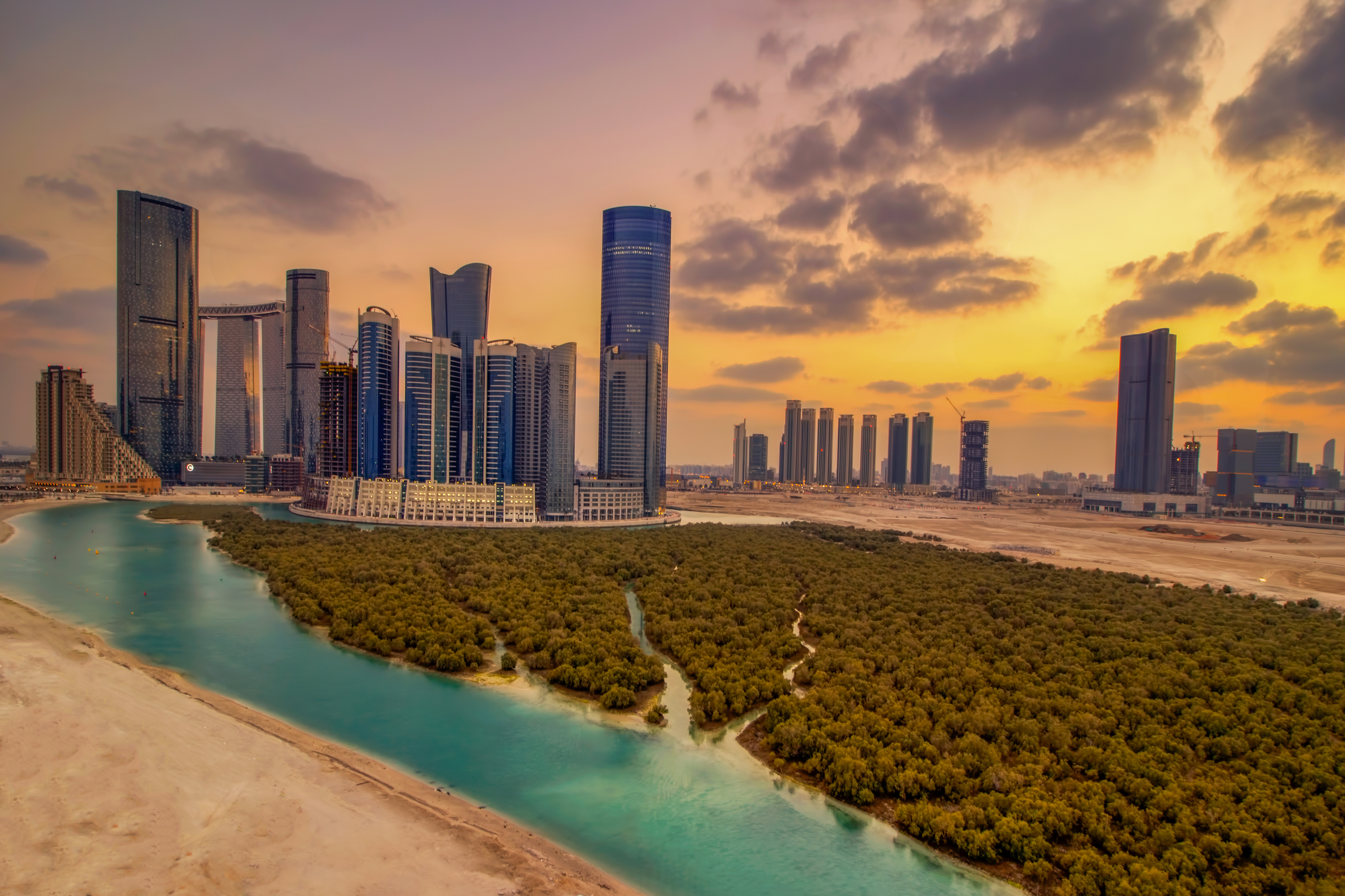 Al reem island